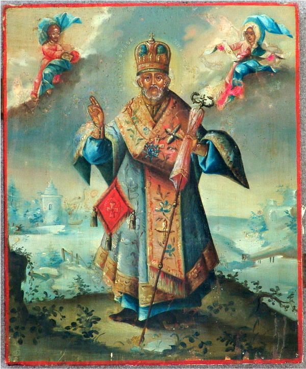 Икона «Святой Николай». Конец XVIII в.